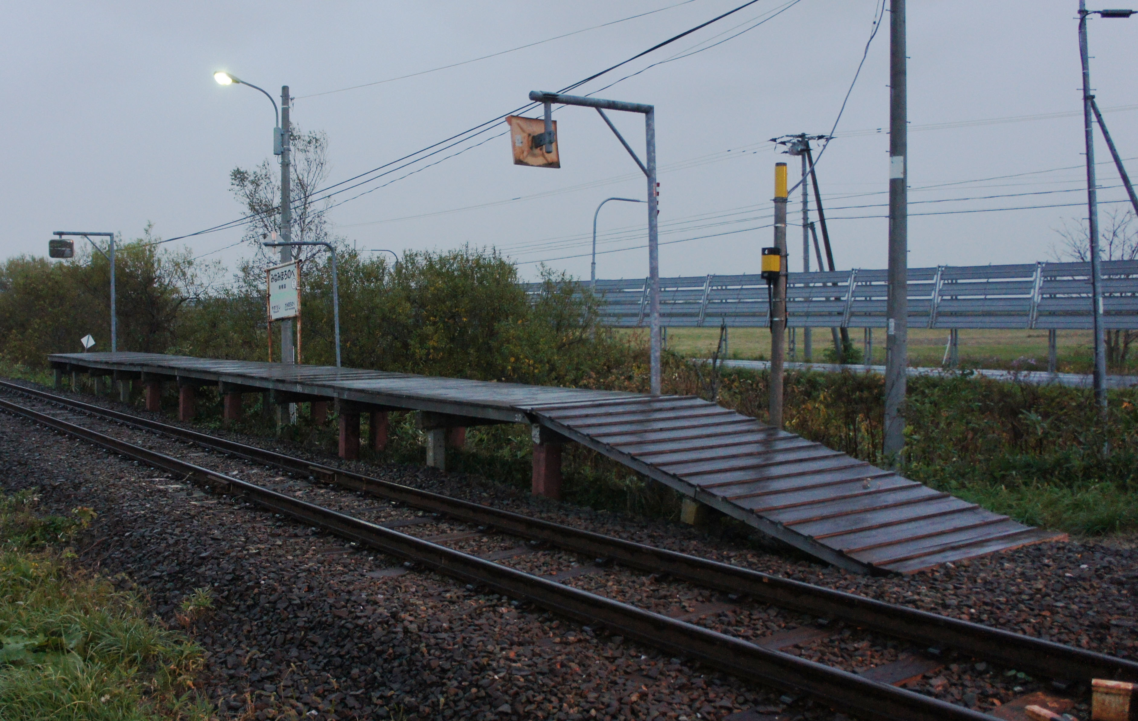 JR宗谷本線・南幌延駅全体 Sony NEX-3